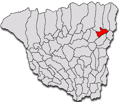 Categorie:Hărţi ale judeţului Gorj